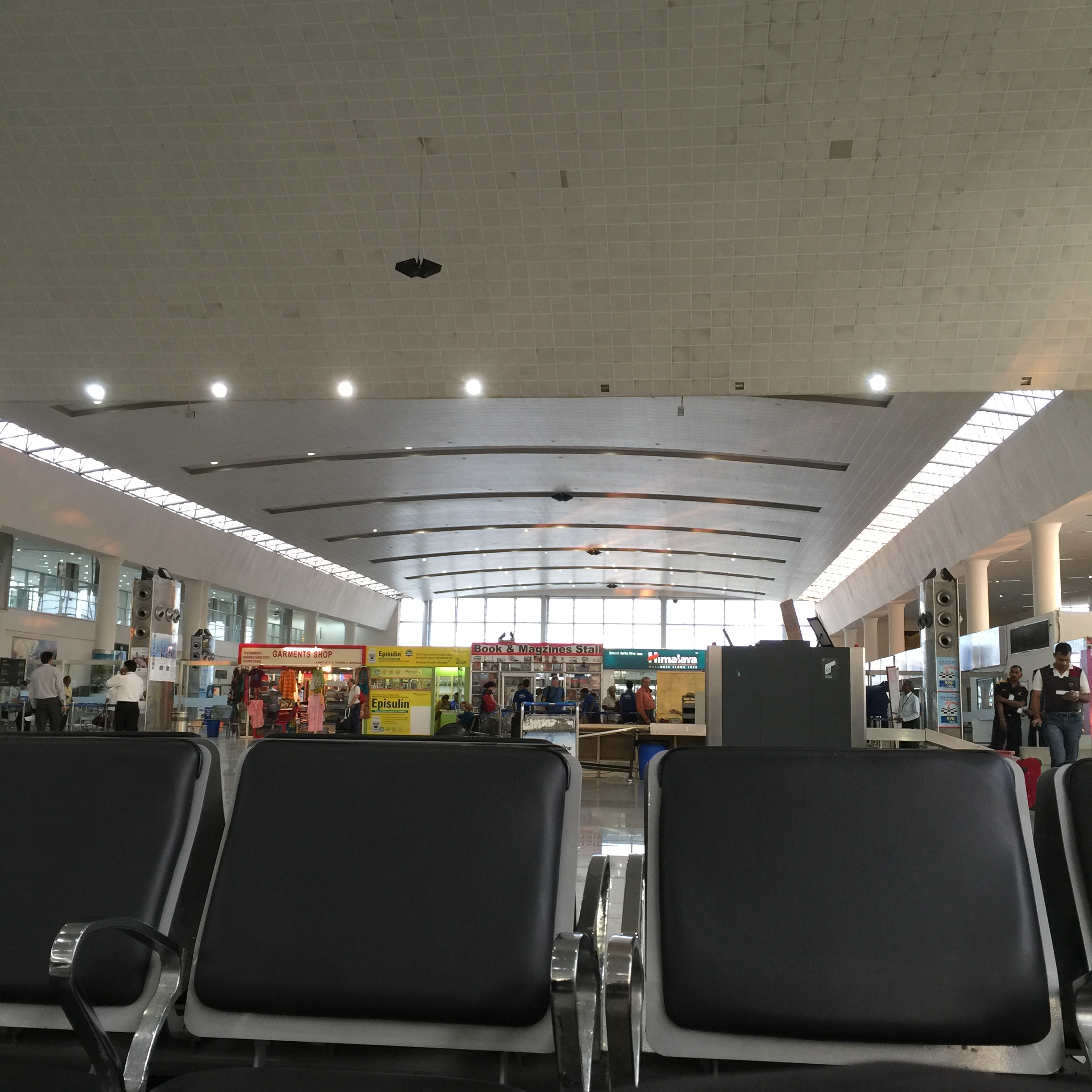 Babatpur, Uttar Pradesh, India